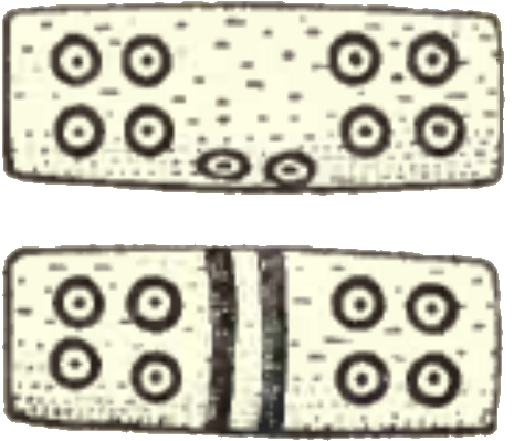 Handgame bones.